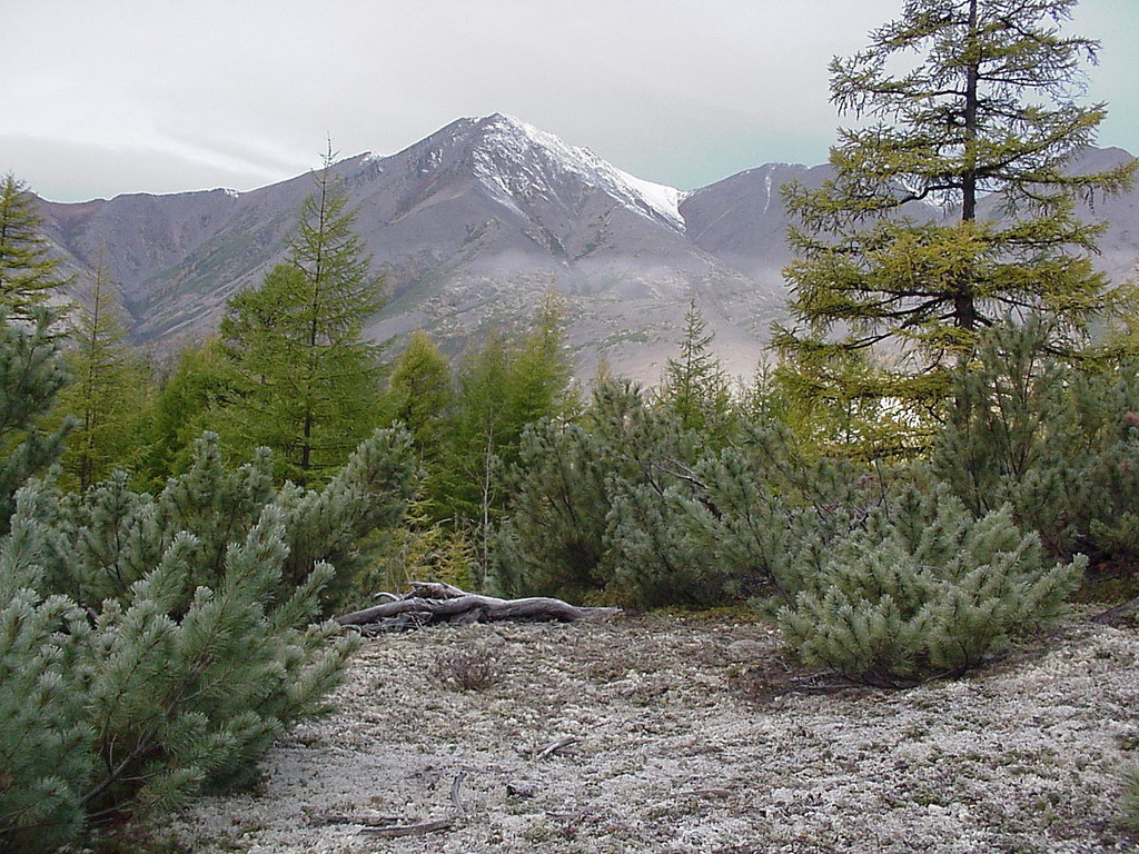 Типичный колымский пейзаж. Магаданская область, Тенькинский район, 2000.